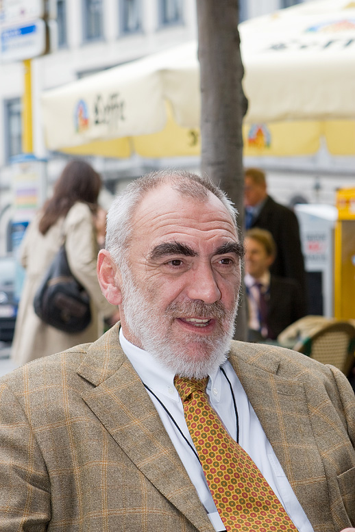 Wolfgang Bulfon, MdEP